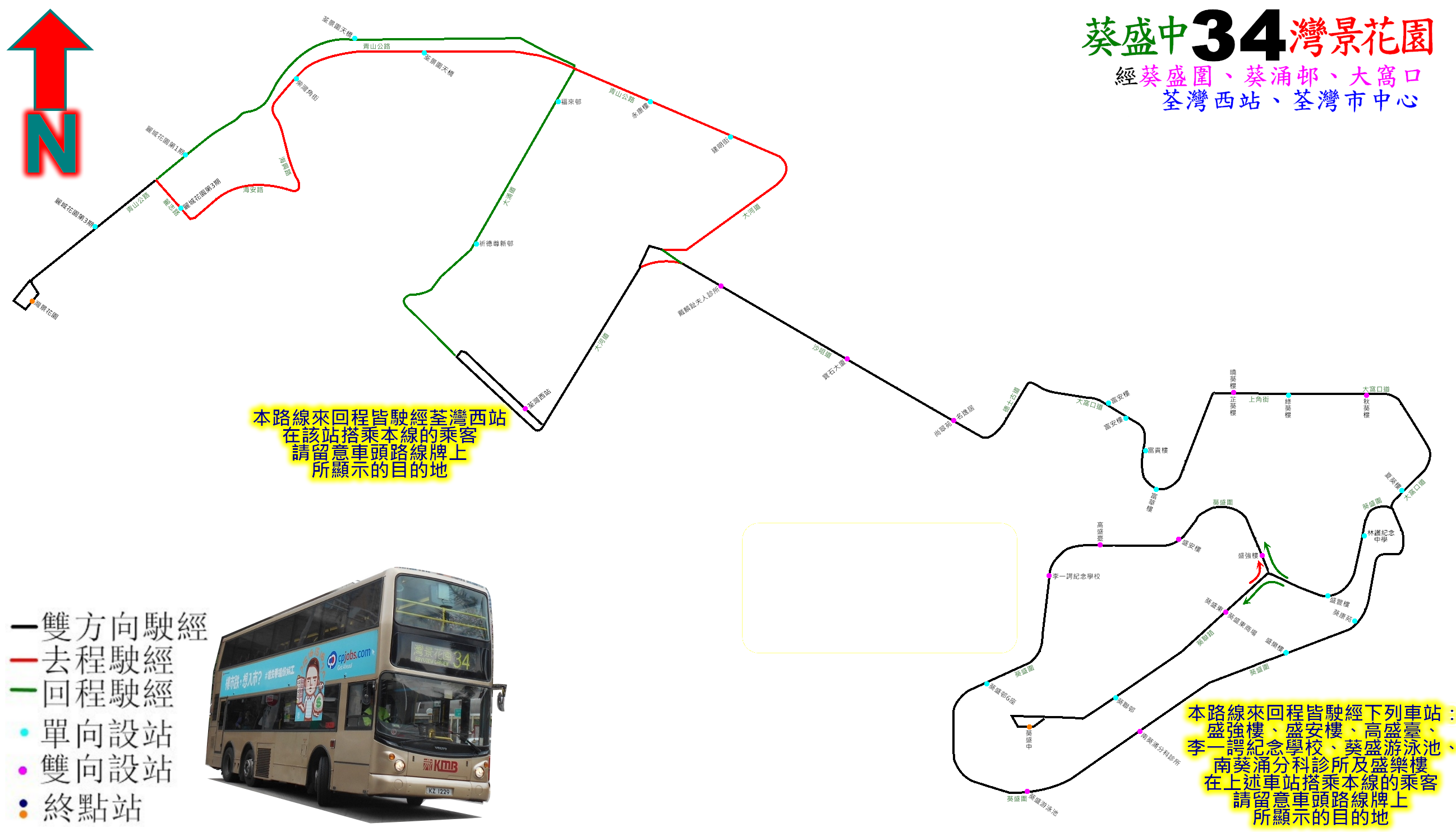 中文（香港）: 九巴34線的走線圖